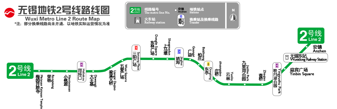 无锡地铁2号线按地形绘制地图